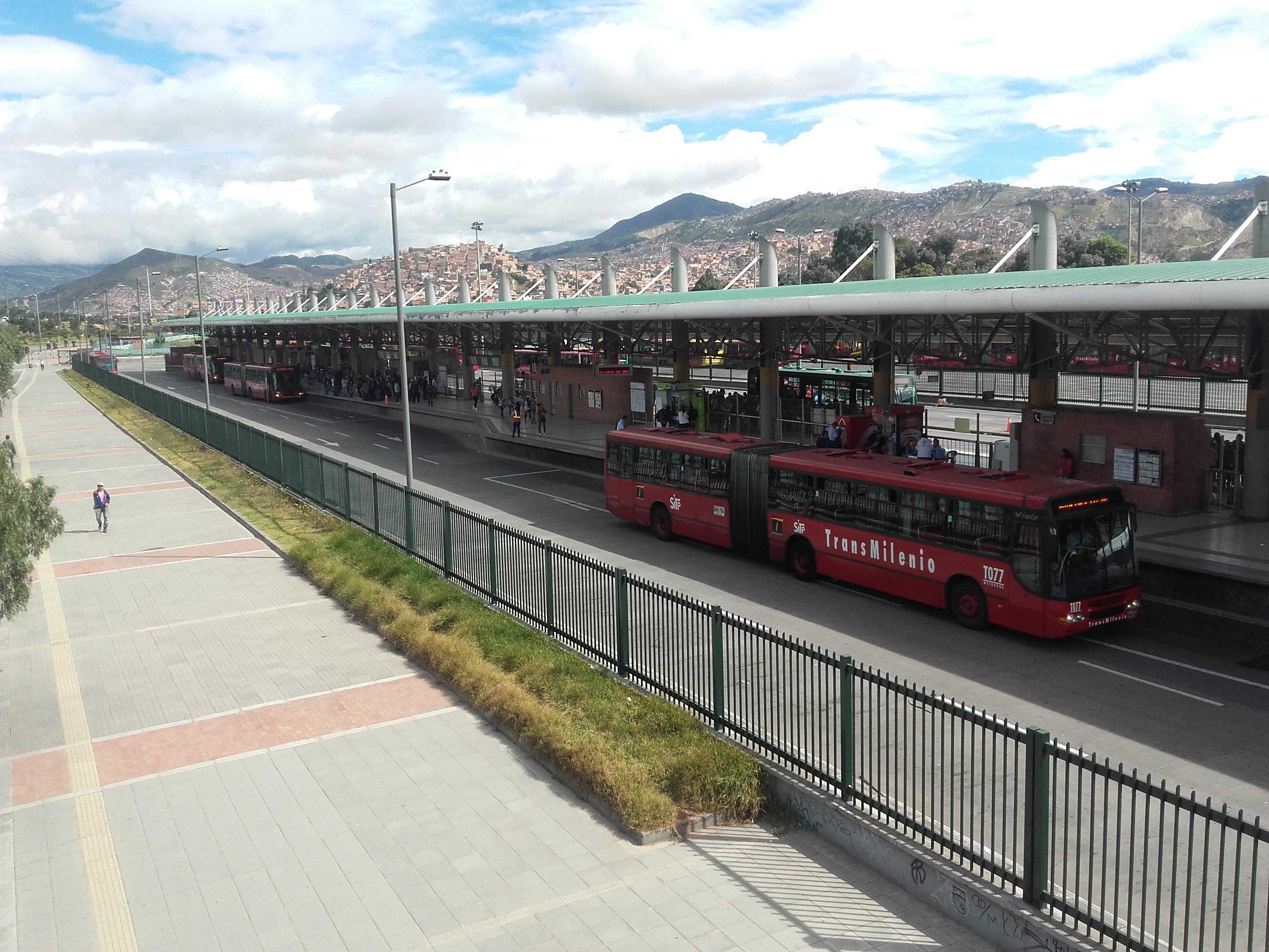 portalesjf